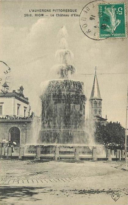 Carte postale ancienne de la faontaine du Château d'eau à Riom, le jour des "grandes eaux".